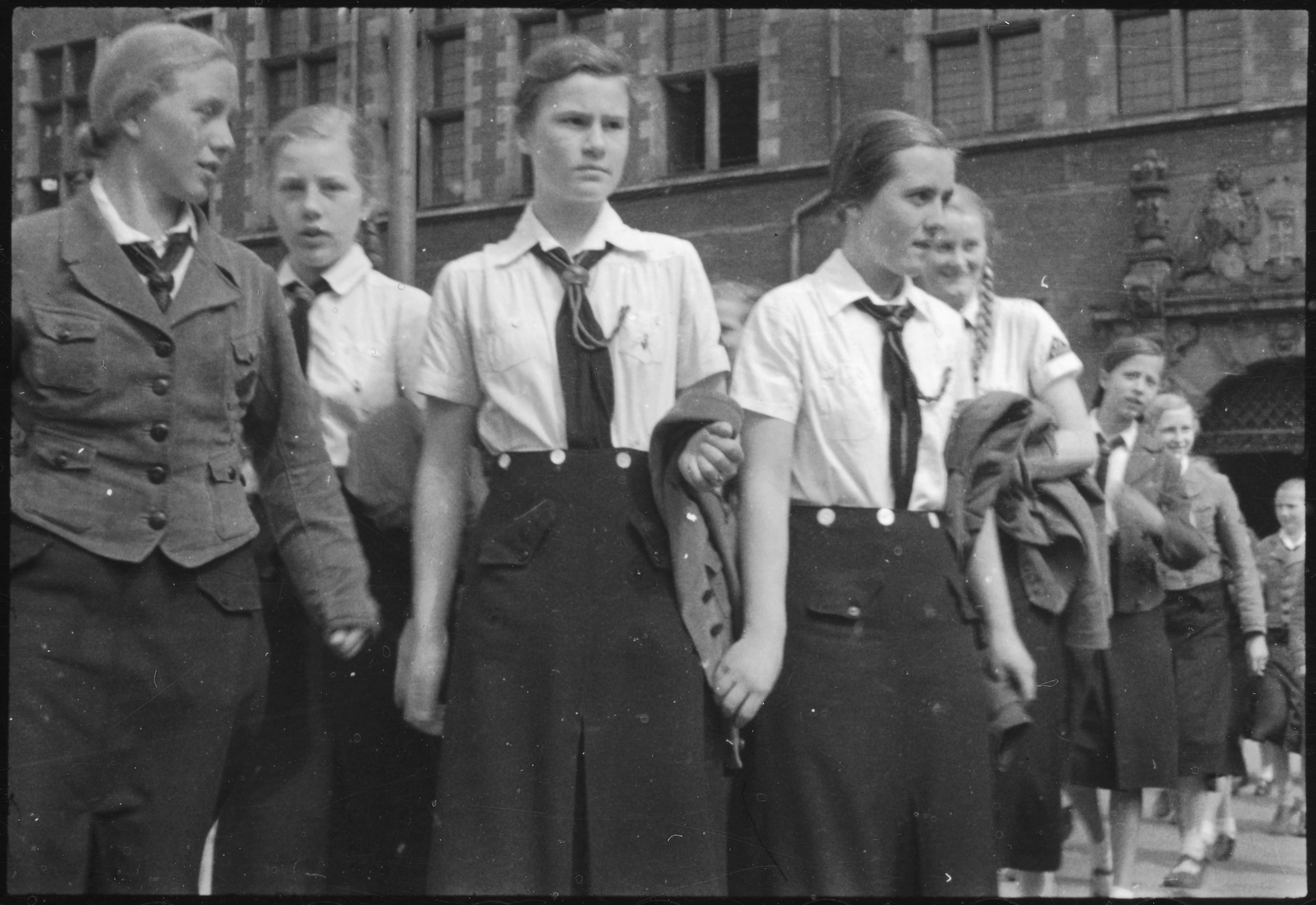 Freie Stadt Danzig, Danzig (Gdansk): Bund Deutscher Mädel; Bund Deutscher Mädel vor dem Rathaus